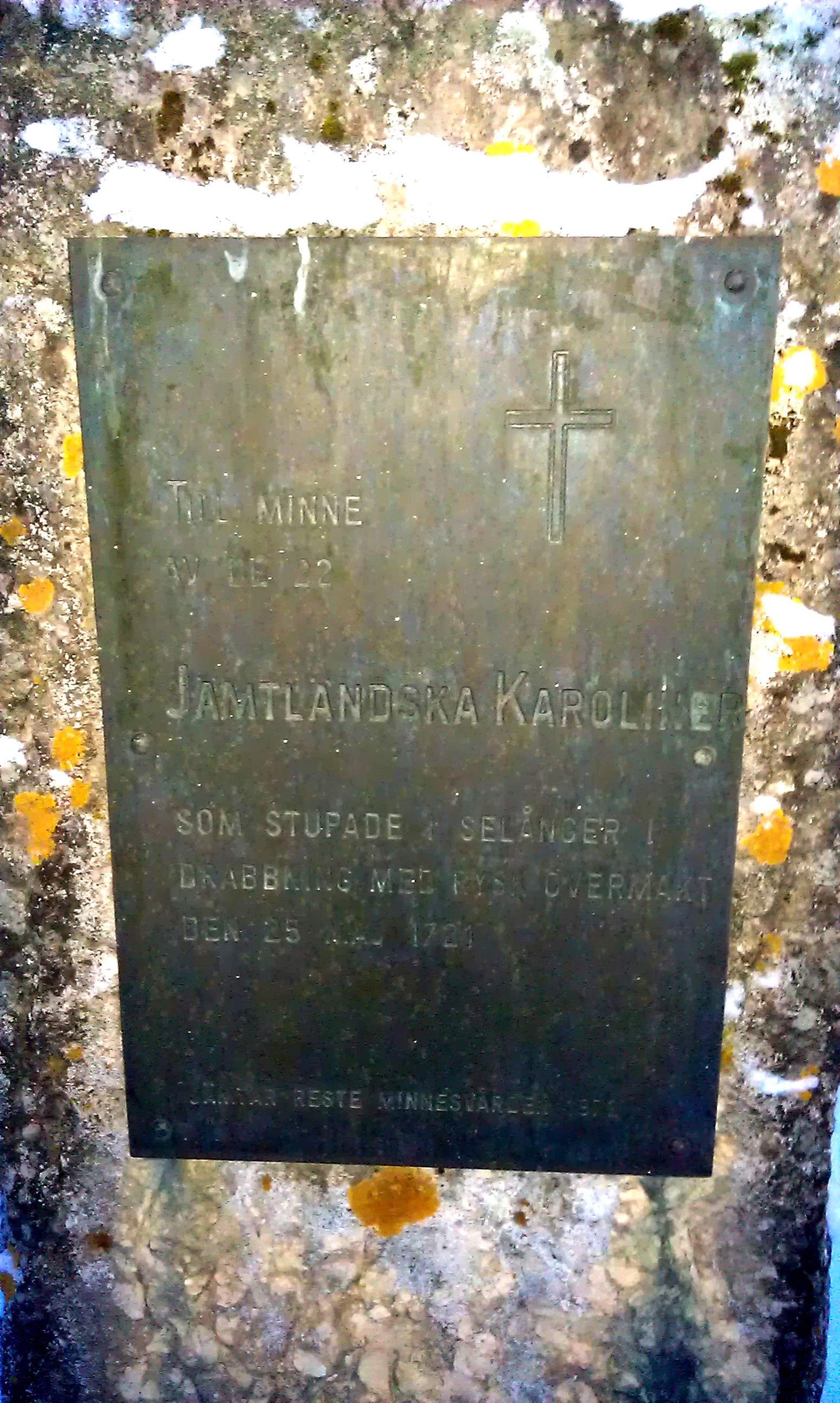 Minnessten vid Selångers gamla kyrka